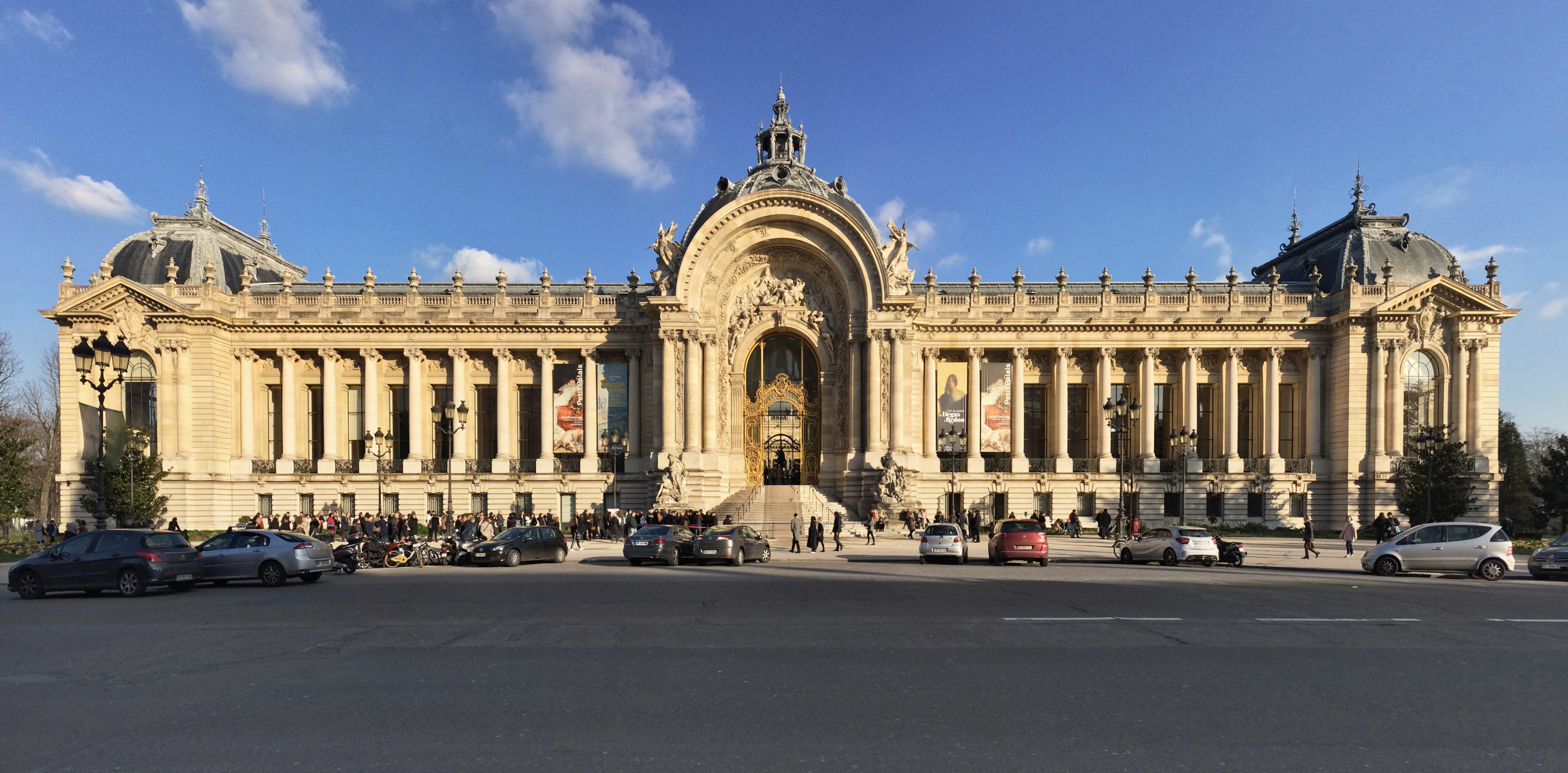 Petit Palais, Musée des Beaux-Arts de la Ville de Paris, Avenue Winston-Churchill, 8e arrondissement, Paris, 1897–1900, Charles Girault